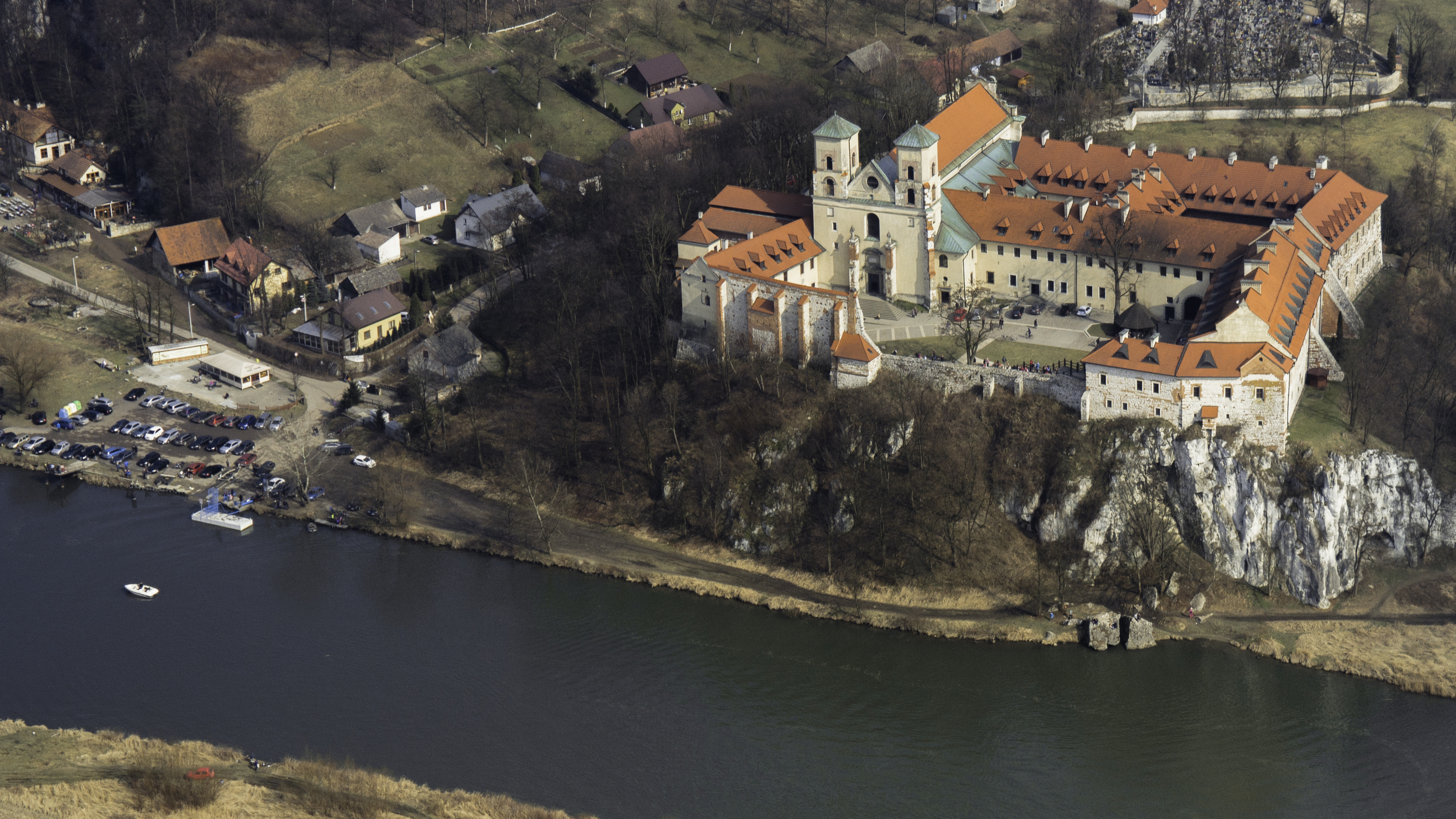 Opactwo Benedyktynów w Tyńcu widziane z powietrza